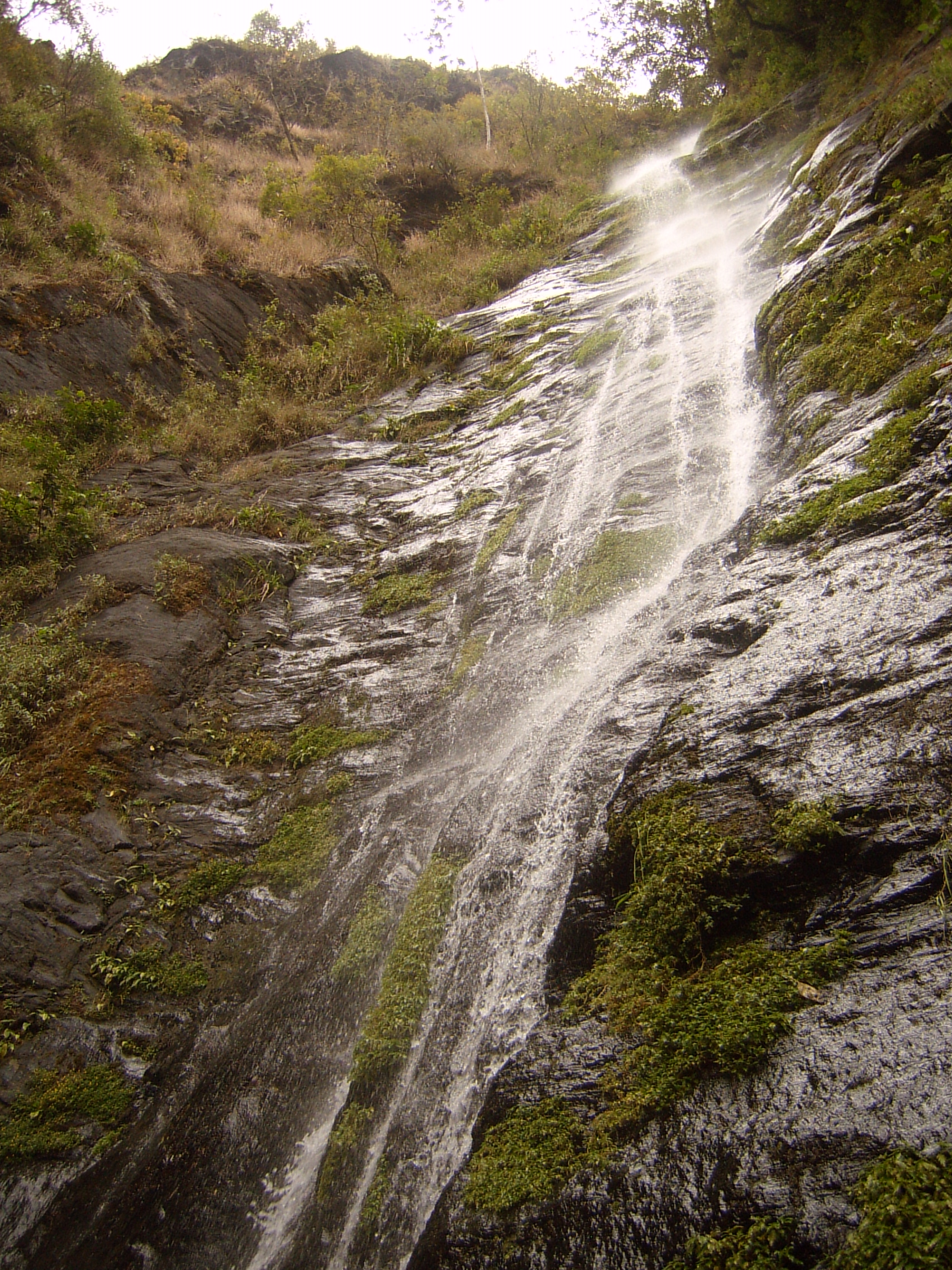 Cascada San Félix. Ubicación: 17 minutos de Coroico, La Paz, Bolivia. Altura 1789 msnm.